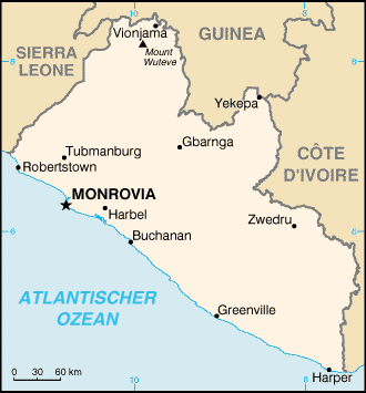 Karte von Liberia aus dem CIA World Factbook